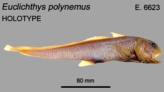 Euclichthys polynemus, голотип